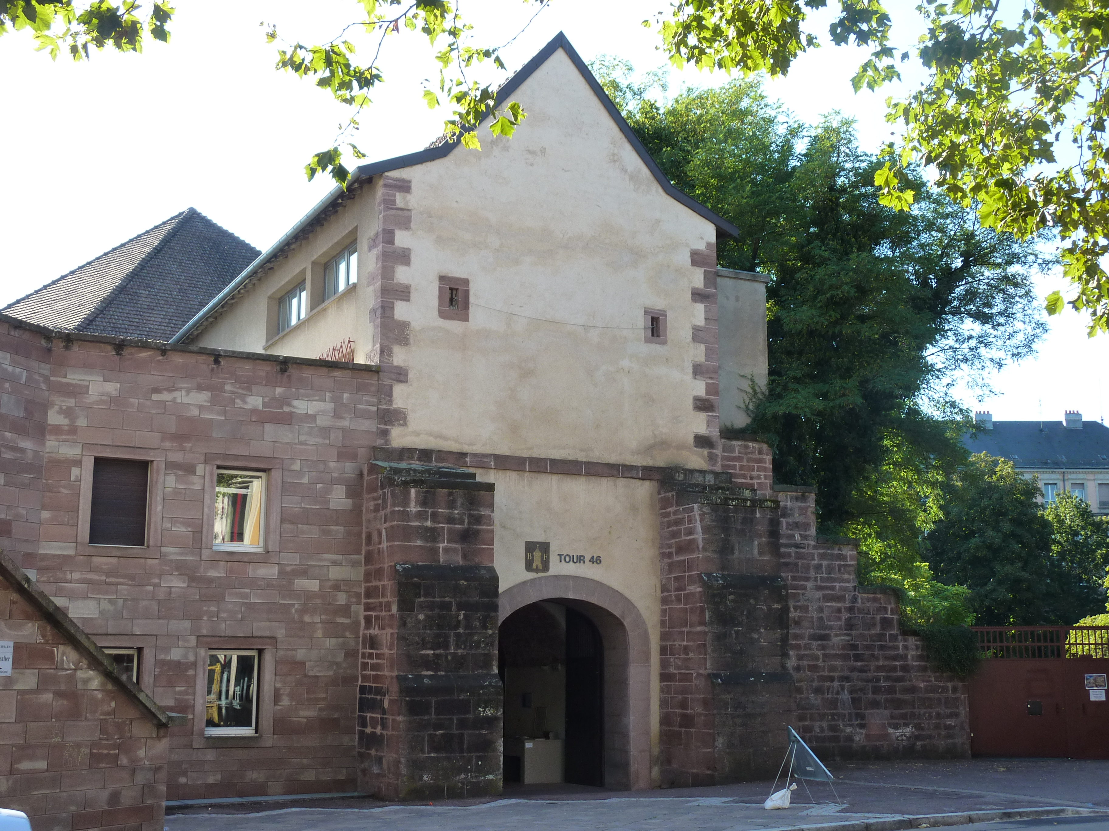 Tour 46 de l'enceinte de Belfort